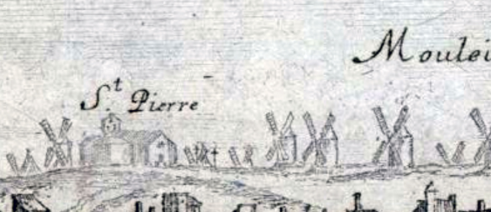 Vue d’Arles en 1660 (détail). Eglise Saint-Pierre des Mouleyres.